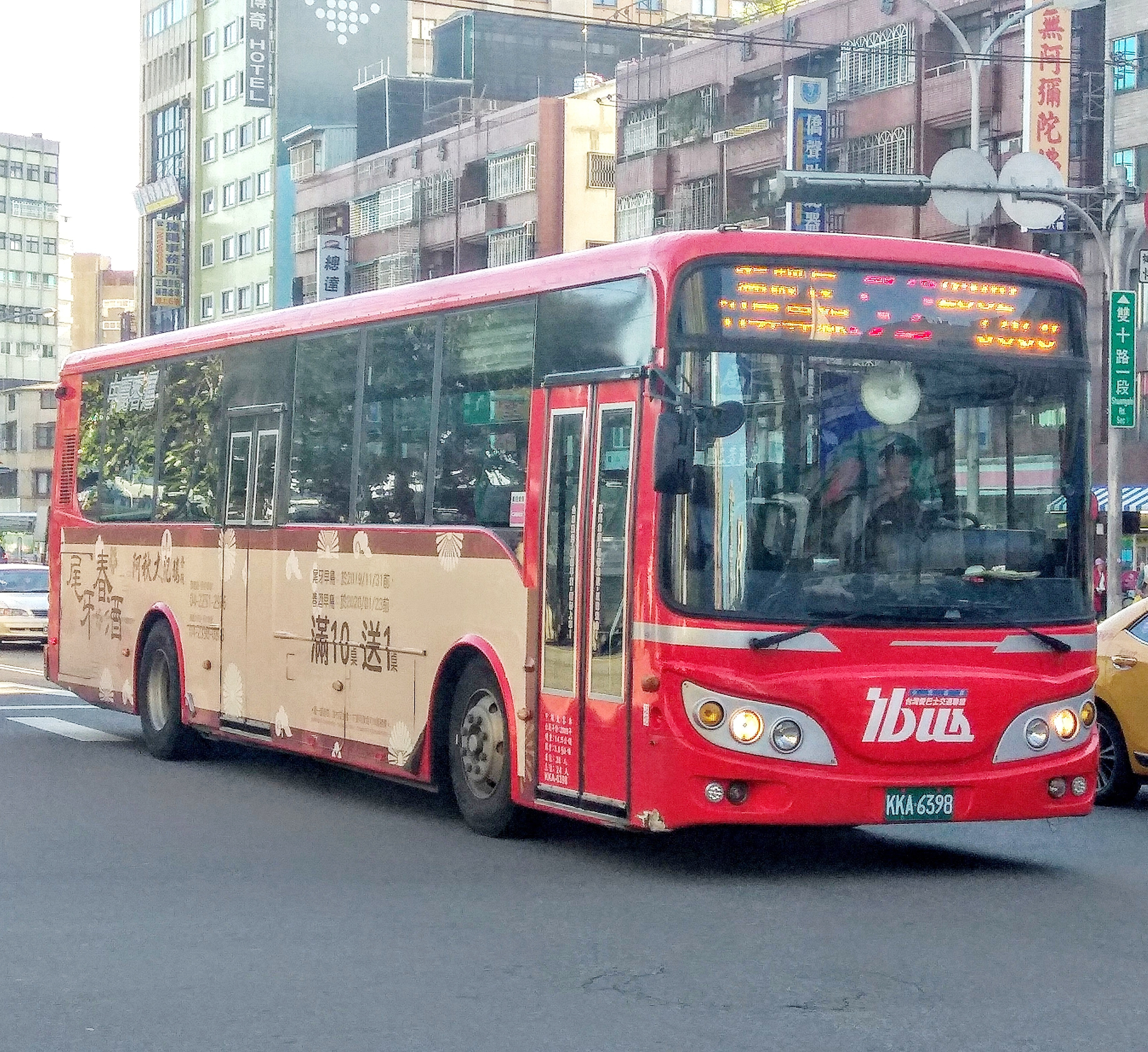 中鹿客運 HINO RK8JRSA大客車 KKA-6398